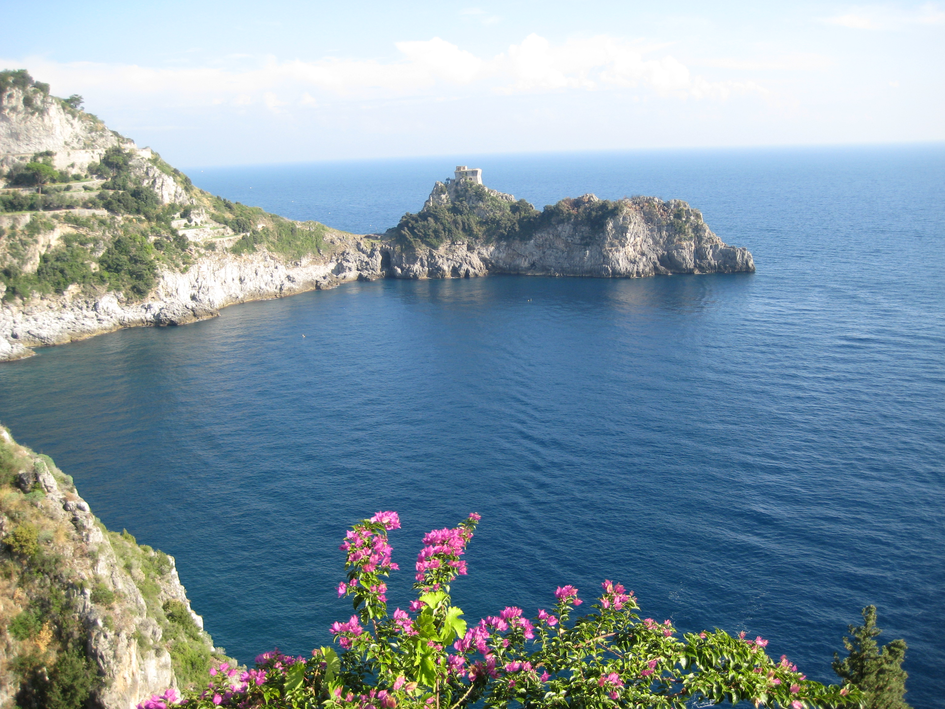 Capo Conca at Conca dei Marini, Almalfi Coast (10/10/2007)